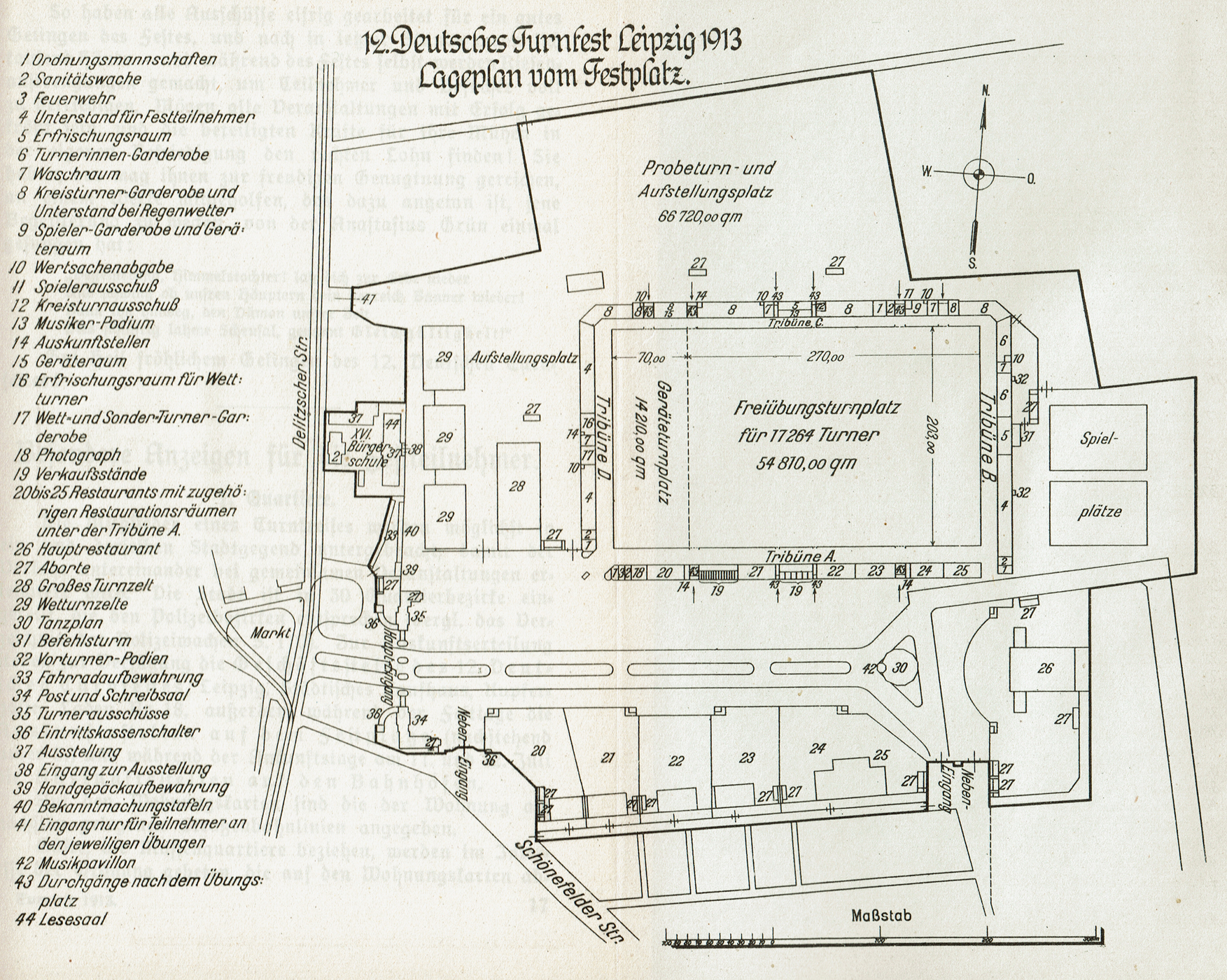 Deutsches Turnfest 1913 in Leipzig, Lageplan des Festplatzes